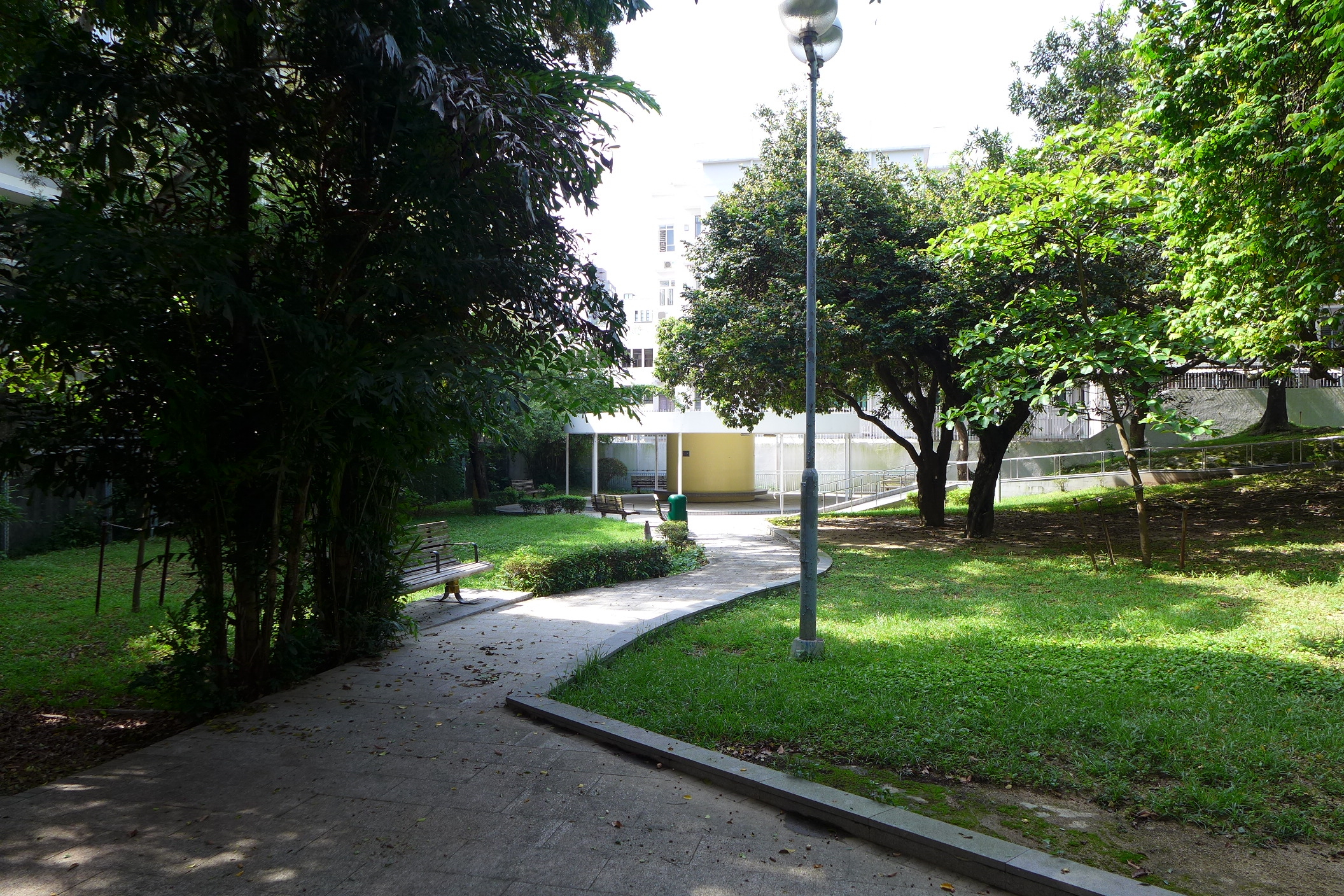 Inverness Road Rest Garden, Kowloon Tsai